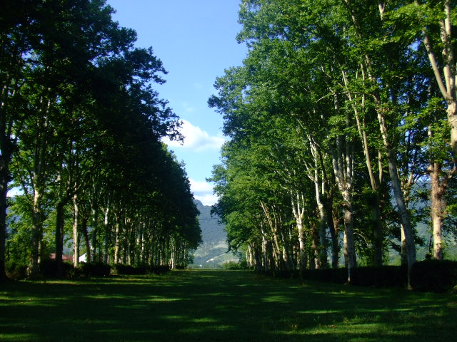 Martvili